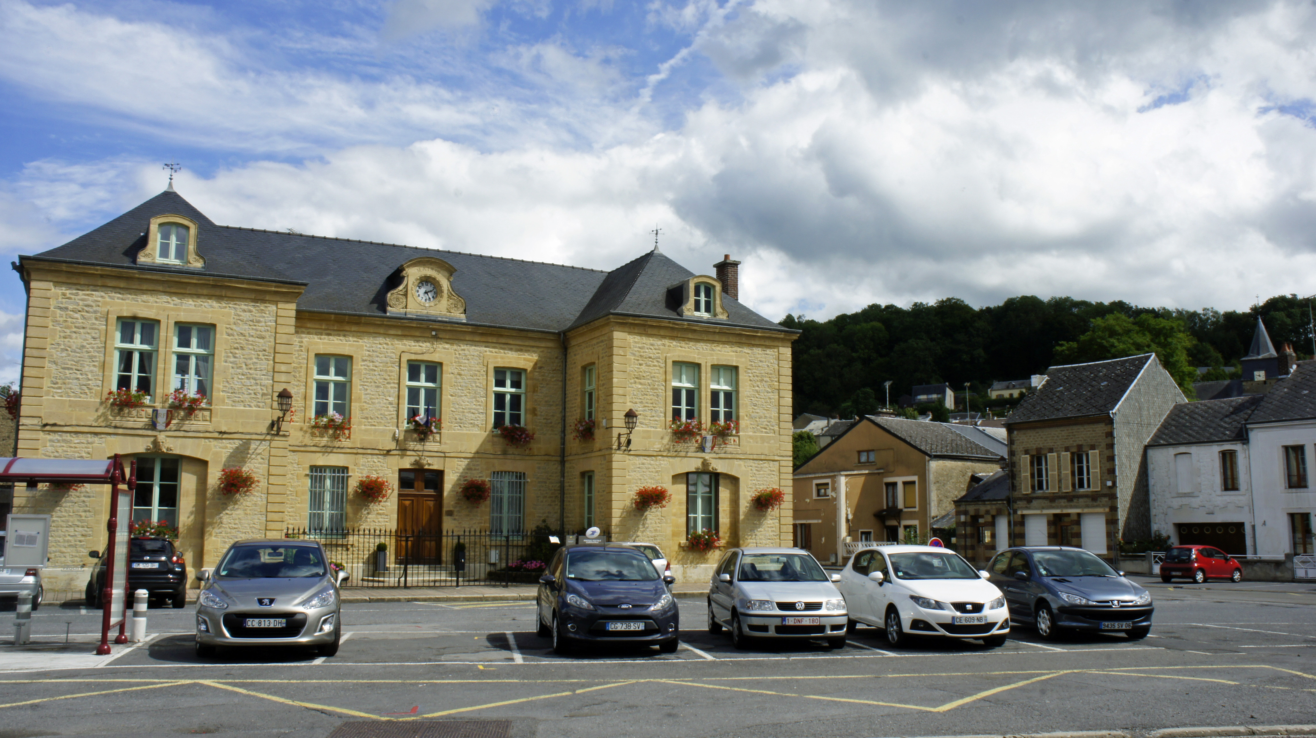 Vue de la mairie de Floing.